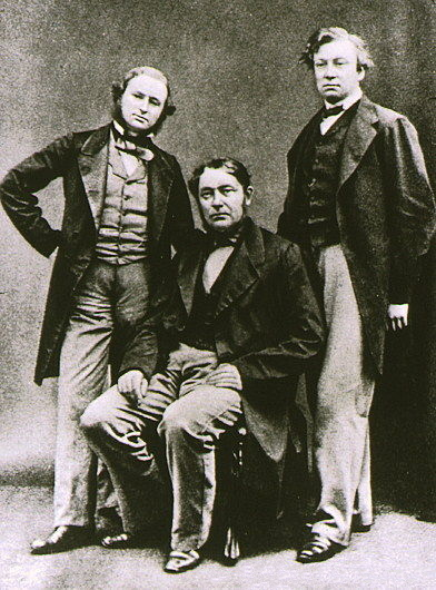 Picture of Gustav Kirchhoff (left), Robert Bunsen (center), and Henry Enfield Roscoe (right). - Roscoe left Heidelberg 1857-1859. Henry Enfield Roscoe (* 7. Januar 1833 in London; † 18. Dezember 1915 in West Horsley) Robert Wilhelm Eberhard Bunsen (* 30. März 1811 in Göttingen; † 16. August 1899 in Heidelberg) Gustav Robert Kirchhoff (* 12. März 1824 in Königsberg (Preußen); † 17. Oktober 1887 in Berlin)